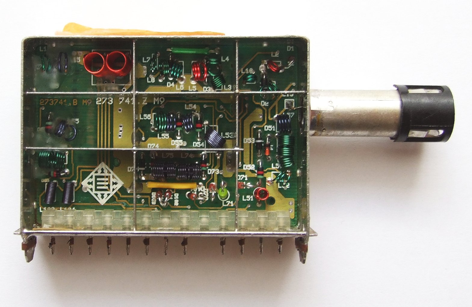 VHF/UHF TV tuner.